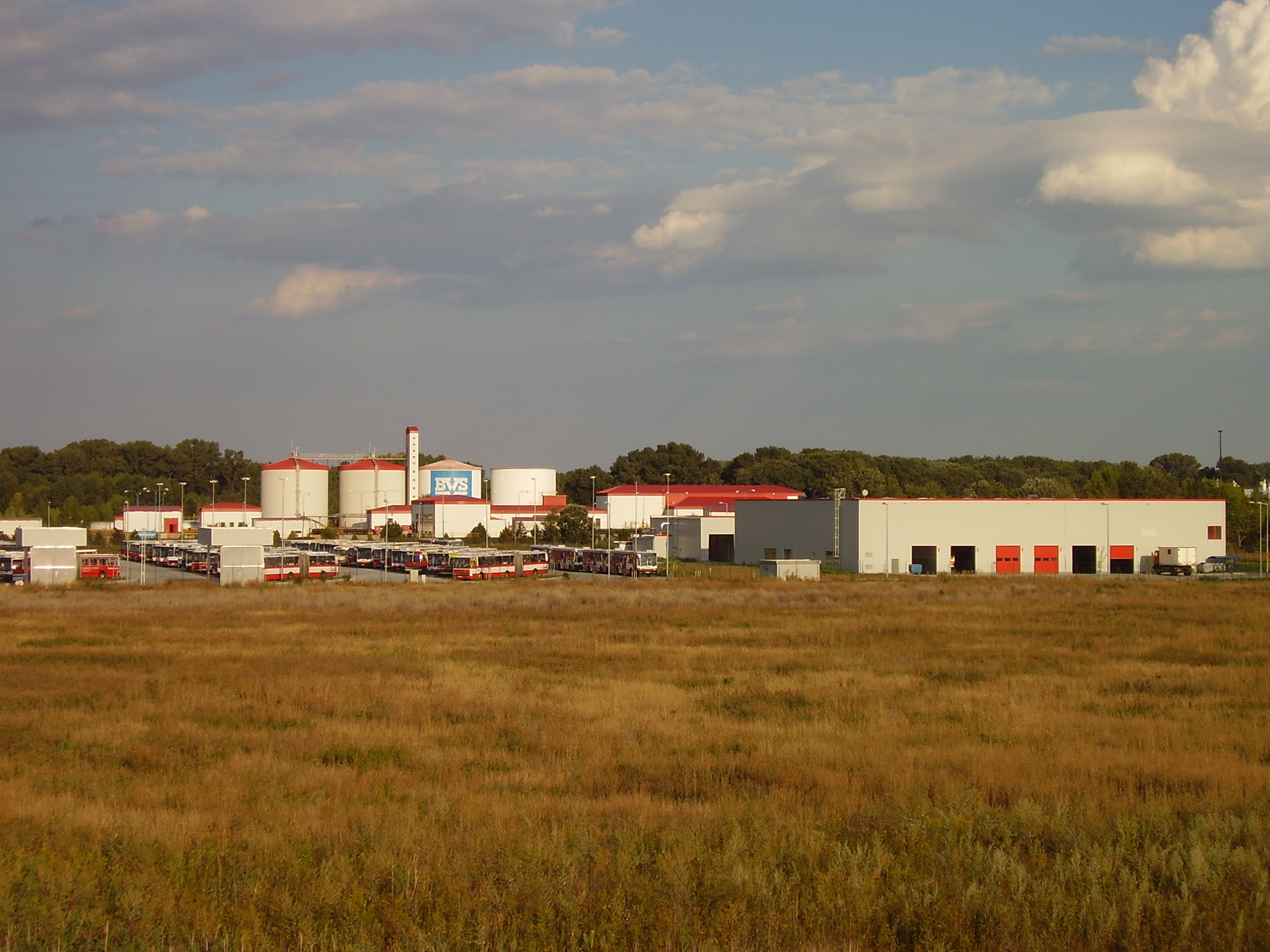 Bratislava